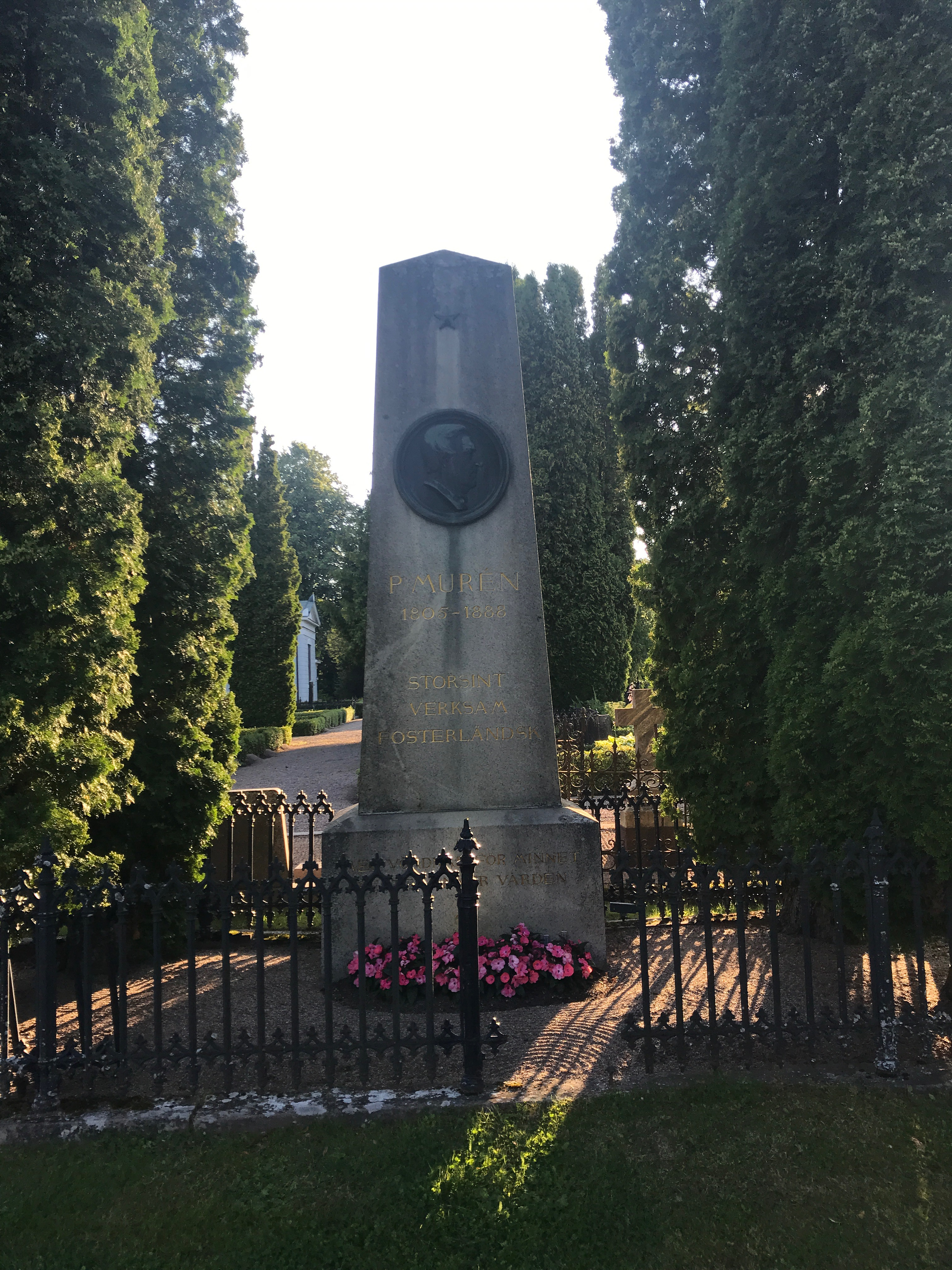 Gävle, Sverige, July 2019